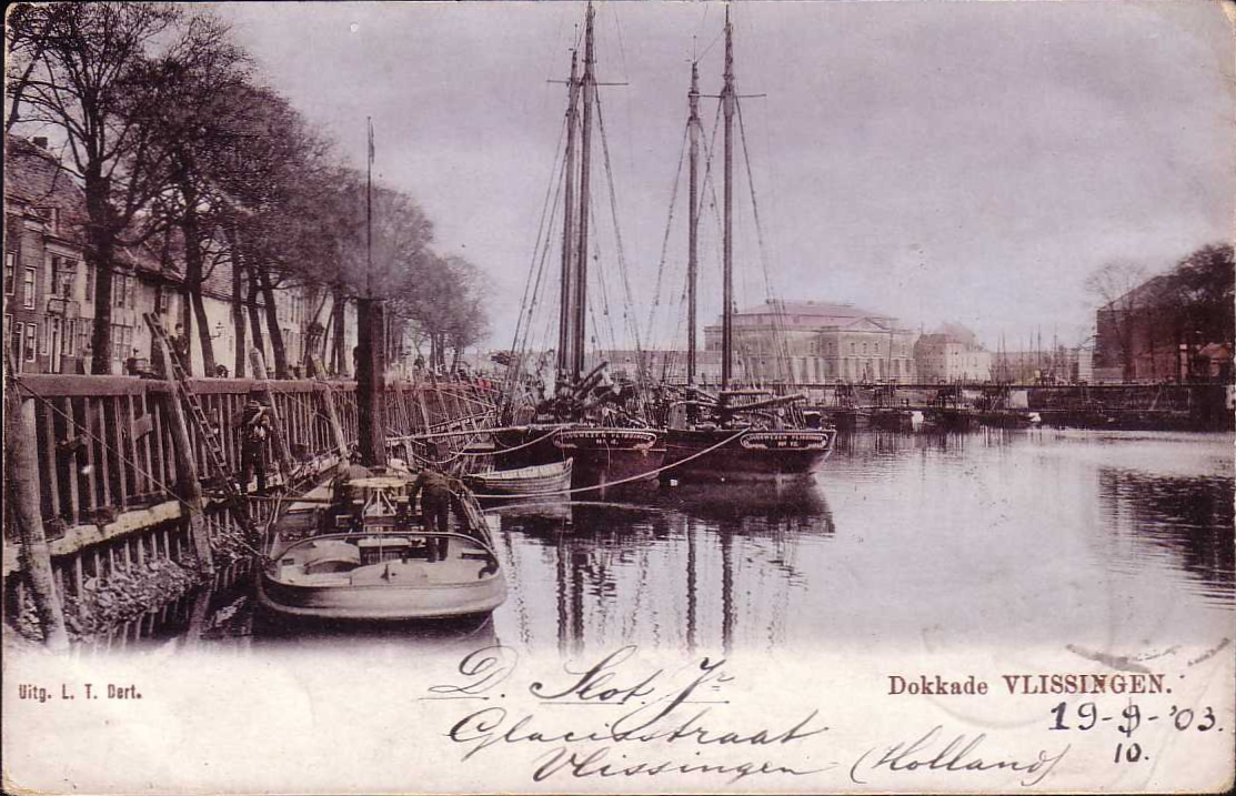 Vlissingen Dokkade (Harbour)